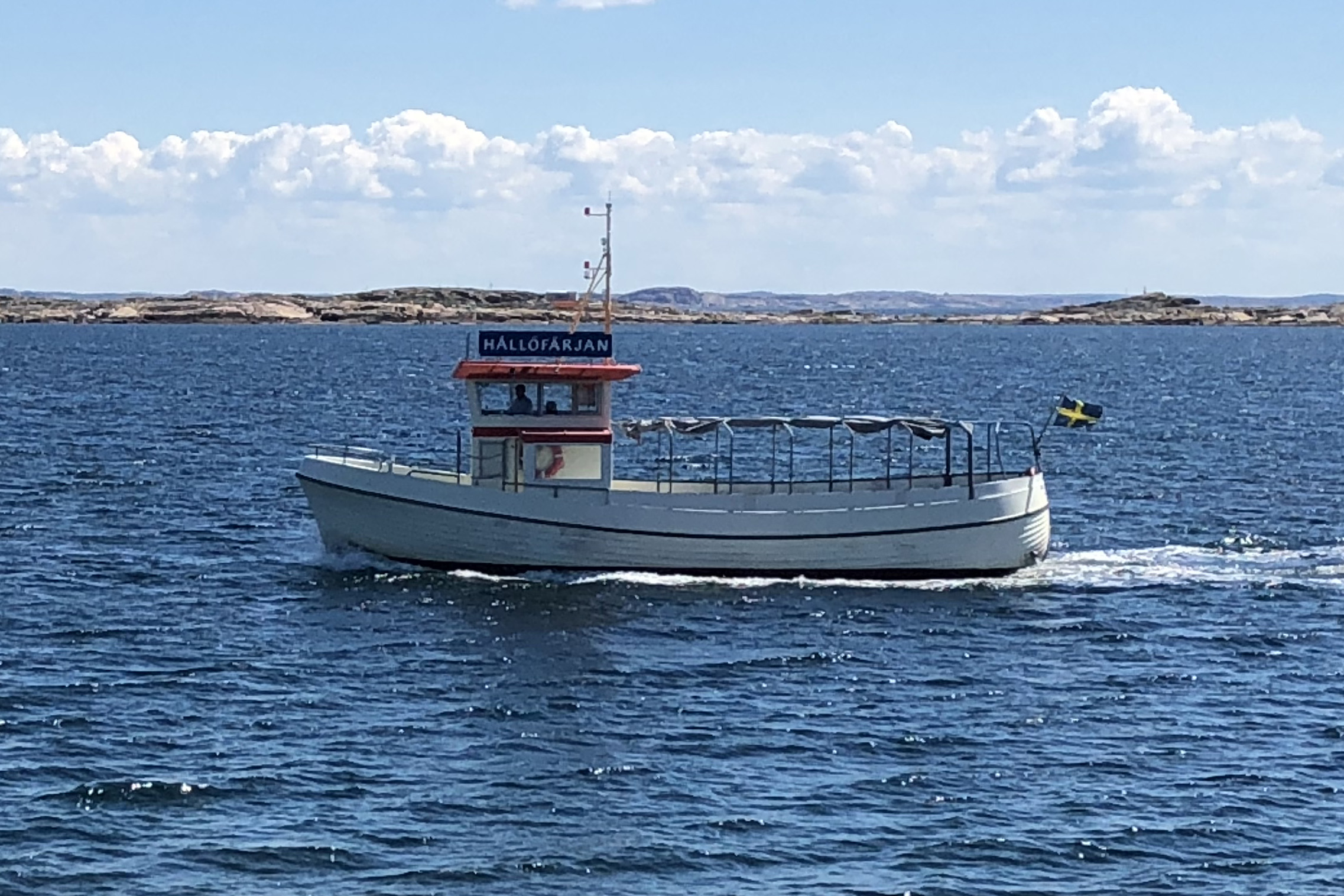 Hållöfärjan, som avgår från Smögen till Hållö. Juli 2018